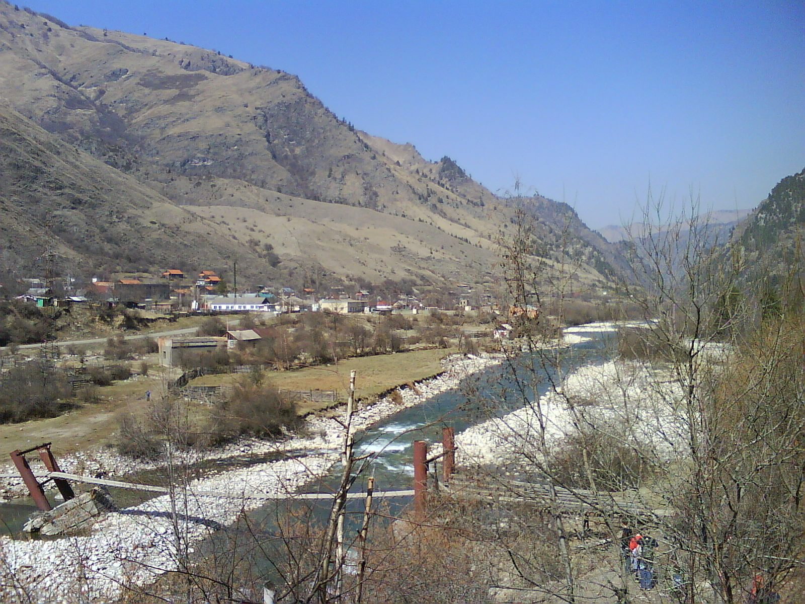 Река Кубань